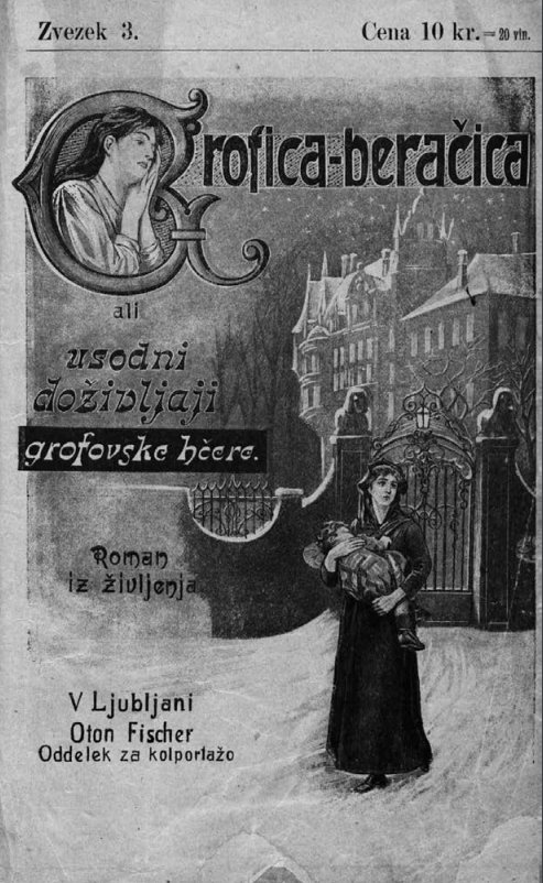 Naslovna stran enega od zvezkov kolportažnega romana Grofica beračica, 1902